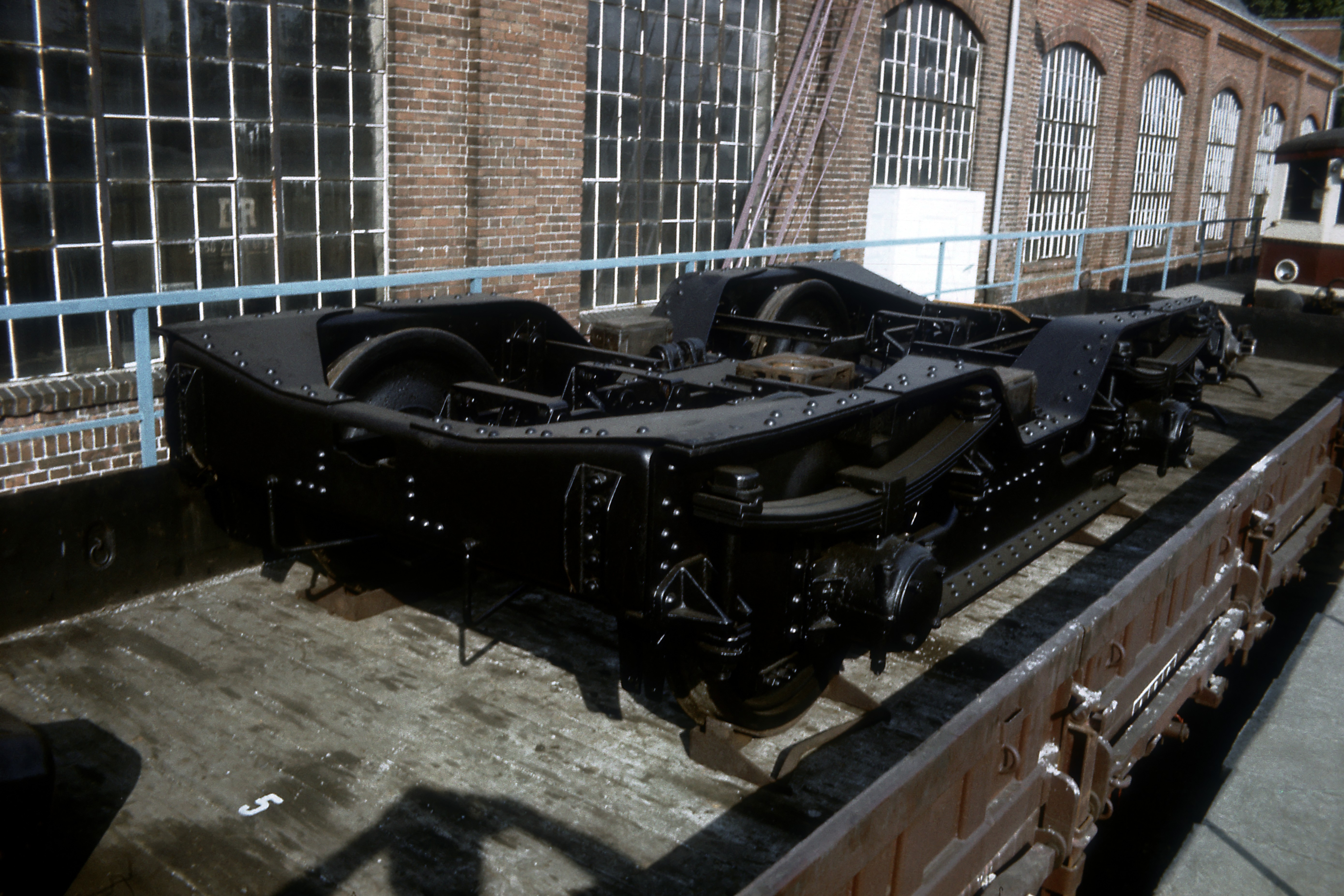 genietetes Laufdrehgestell der Baureihe 275. Fahrzeugausstellung 75 Jahre Bw Grünau